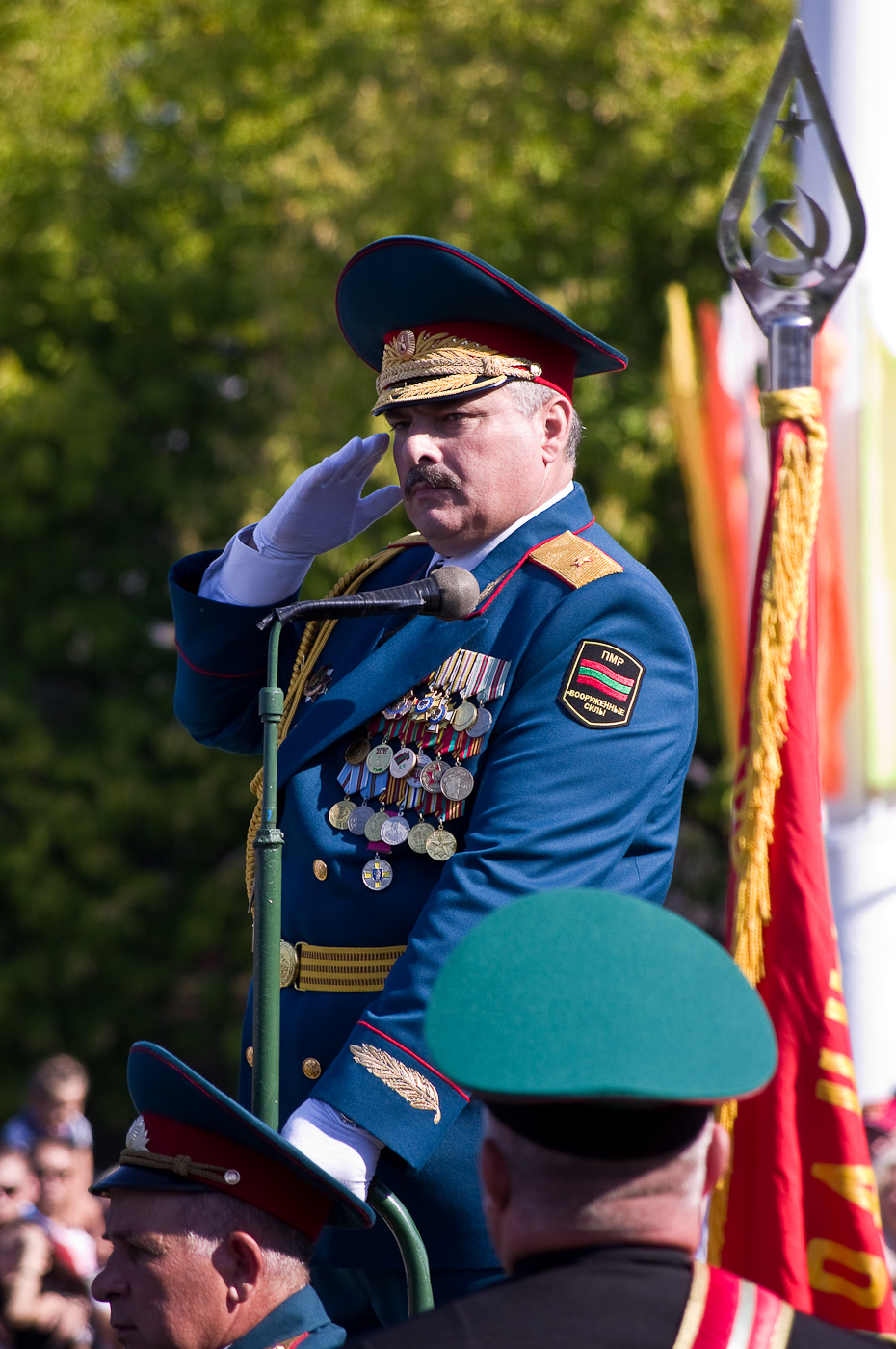 Министр обороны ПМР во время парада 2 сентября 2012 года.